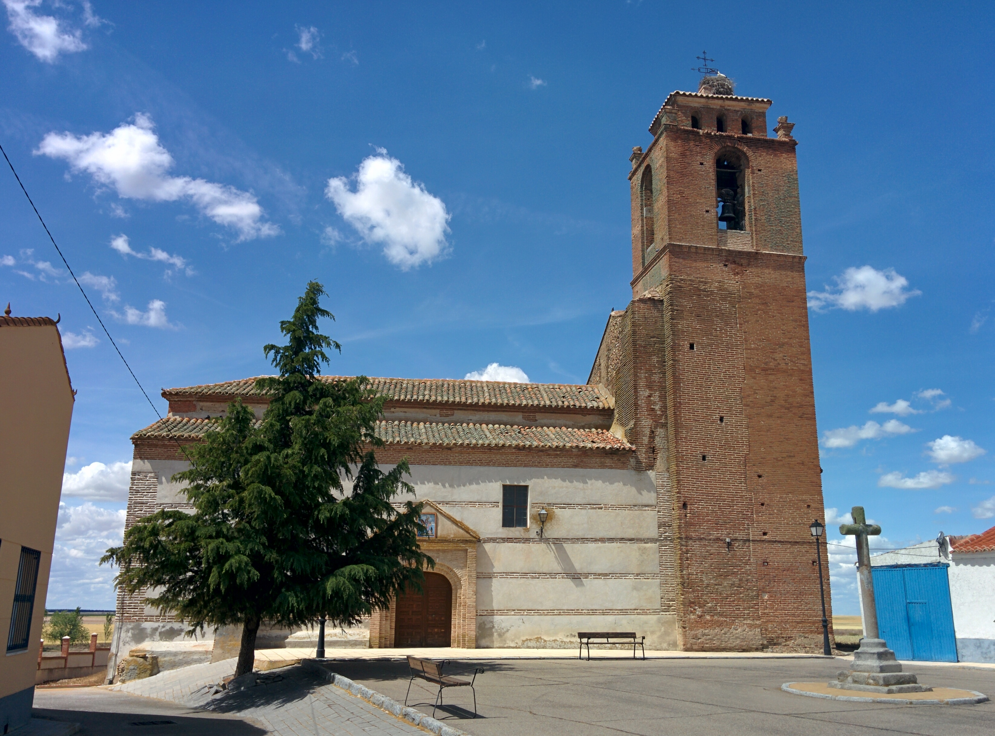 Iglesia de San Martín, en Blasconuño de Matacabras (Ávila, España).